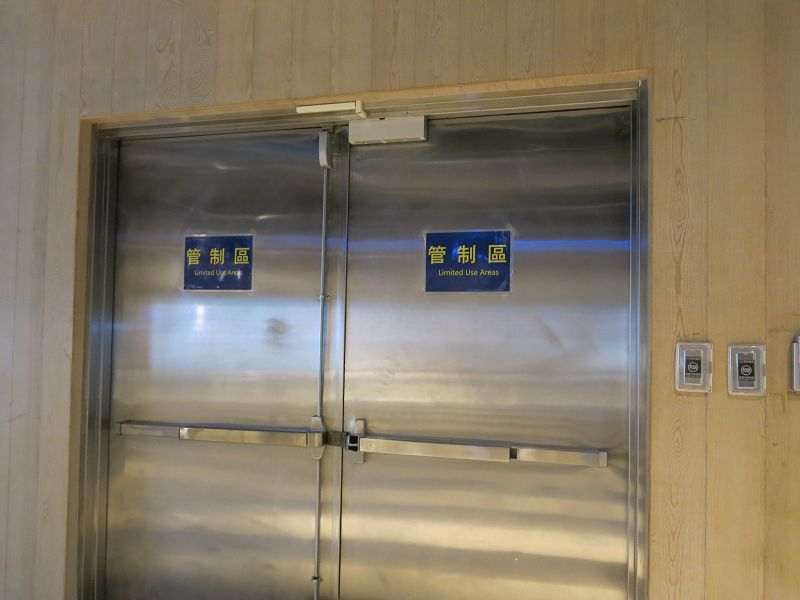 臺北轉運站管制區出入口，內為臺北捷運公司高運量行車控制中心、臺北市交通資訊中心等。